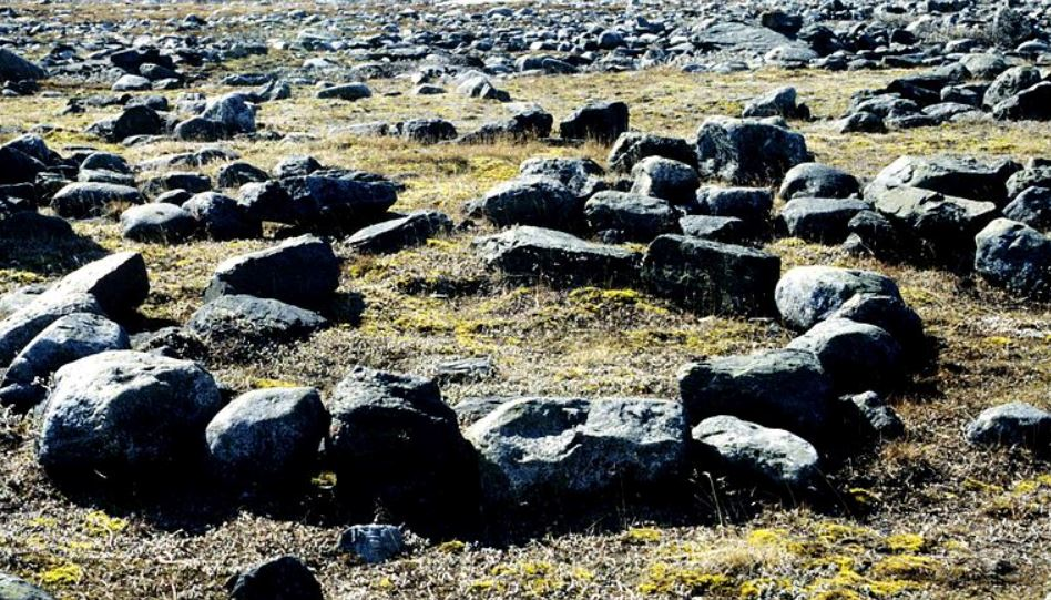 Structure d'un cercle de tente en pierre.